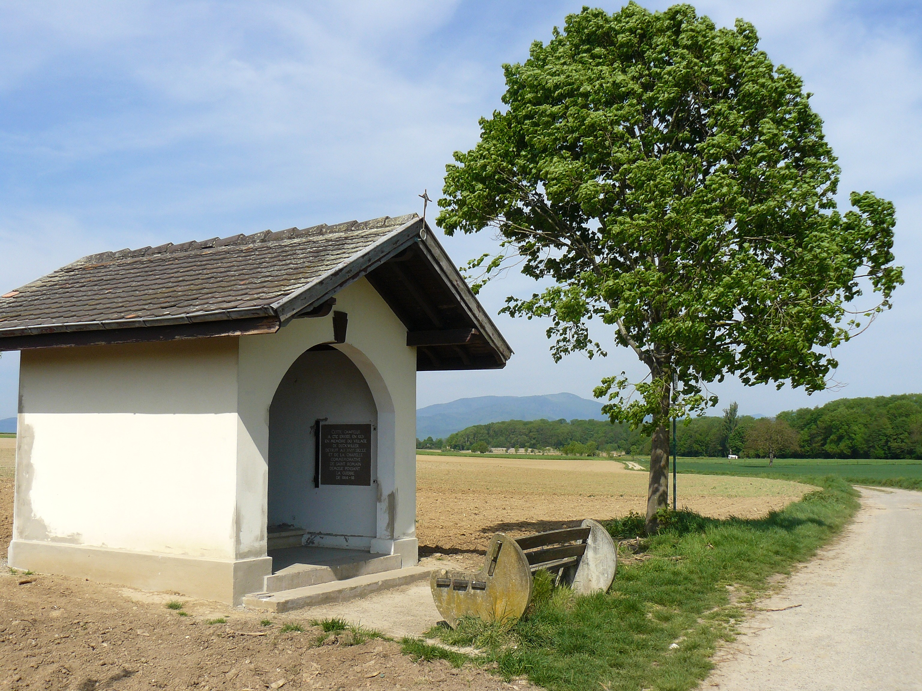 Chapelle de Deckwiller, Reiningue (Haut-Rhin, France)